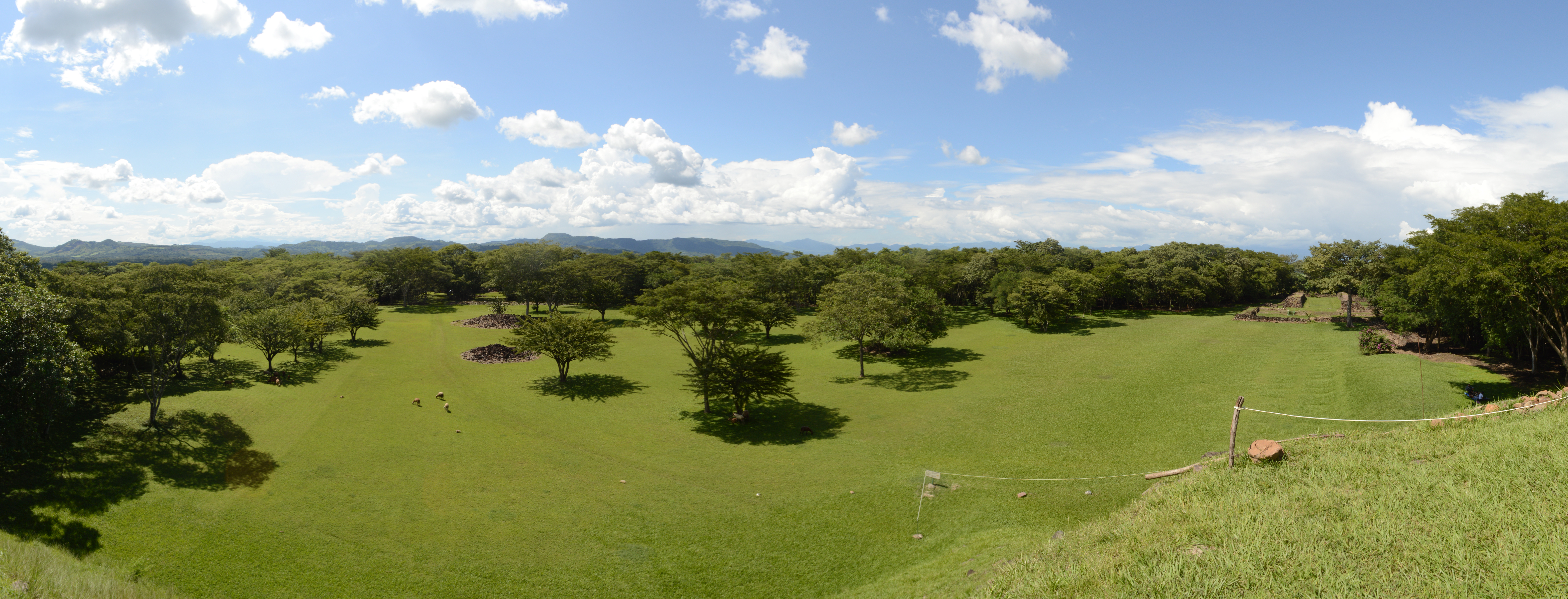 Vista desde la parte alta de la piramide de Cihuatan, Aguilares San Salvador, El Salvador